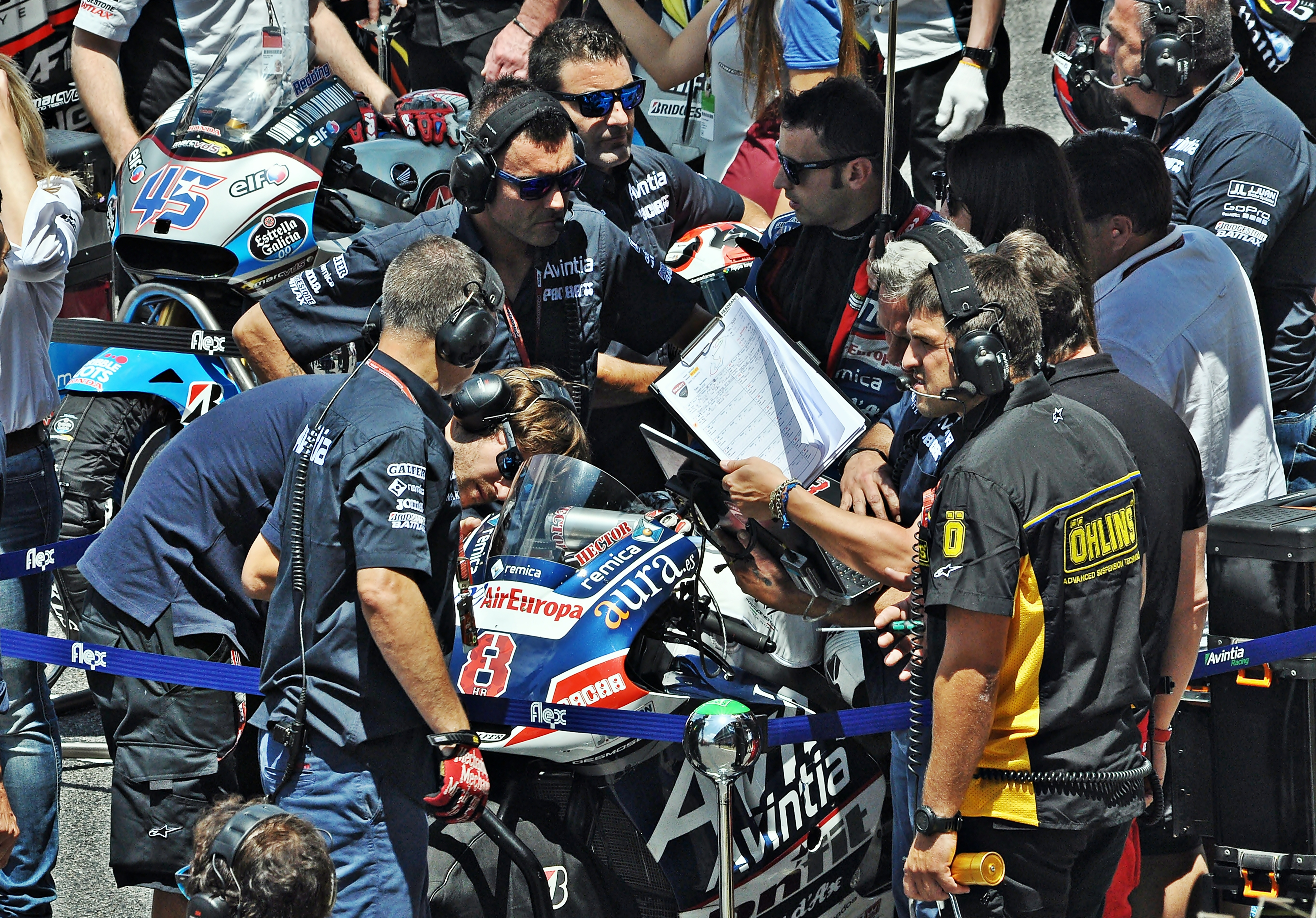 gran premio de cataluña